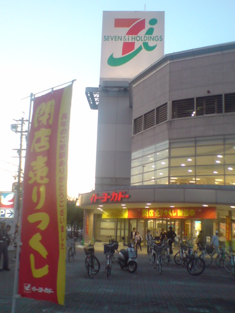 イトーヨーカ堂鳴海店